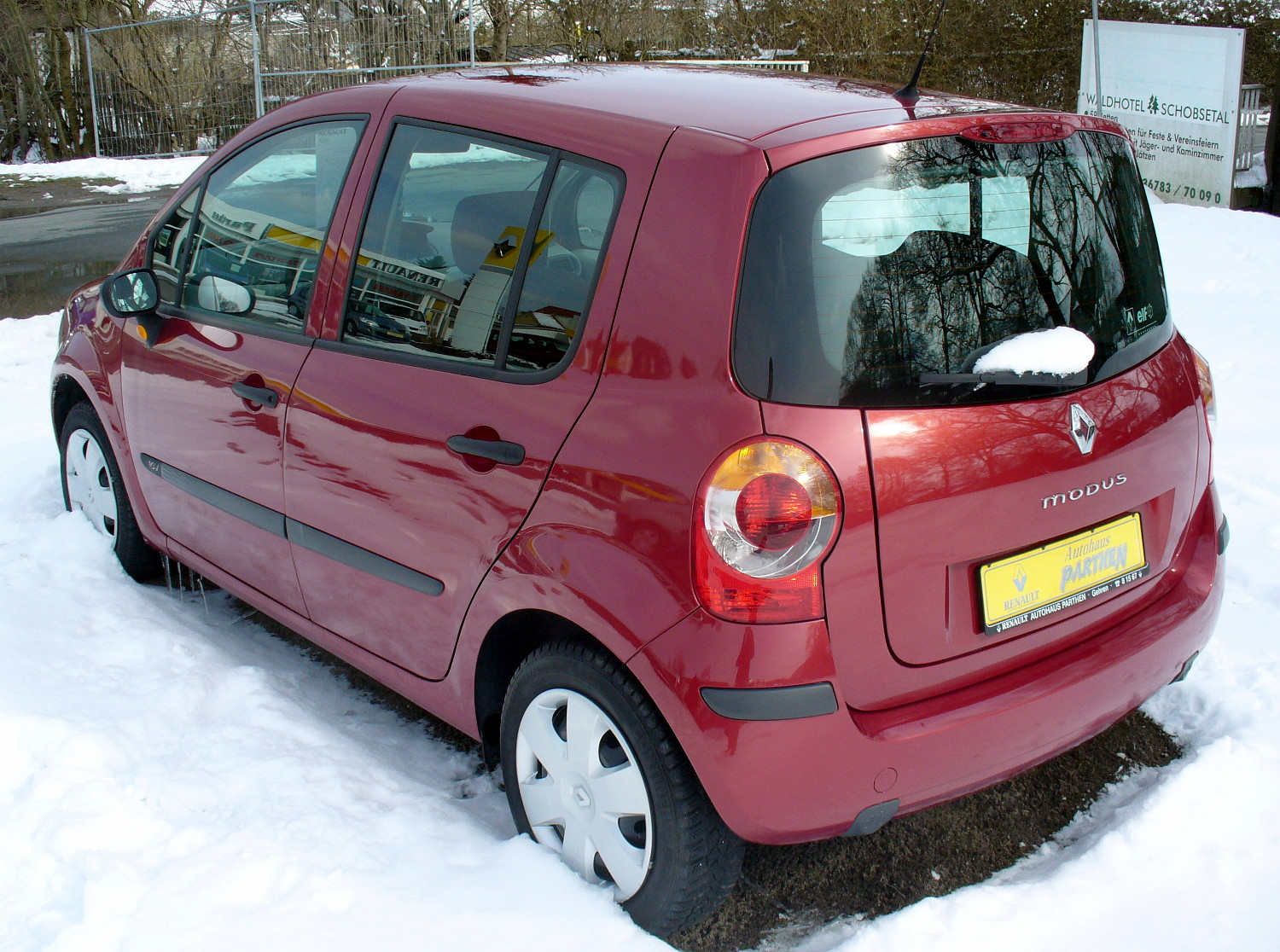 Renault Modus Phase I